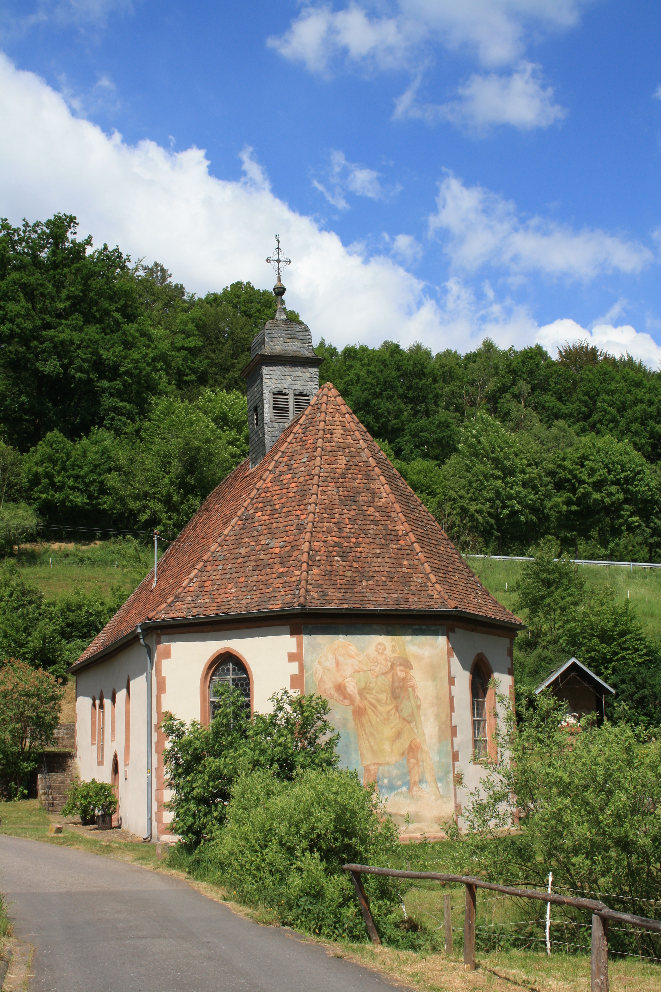 Kapelle Amorsbrunn